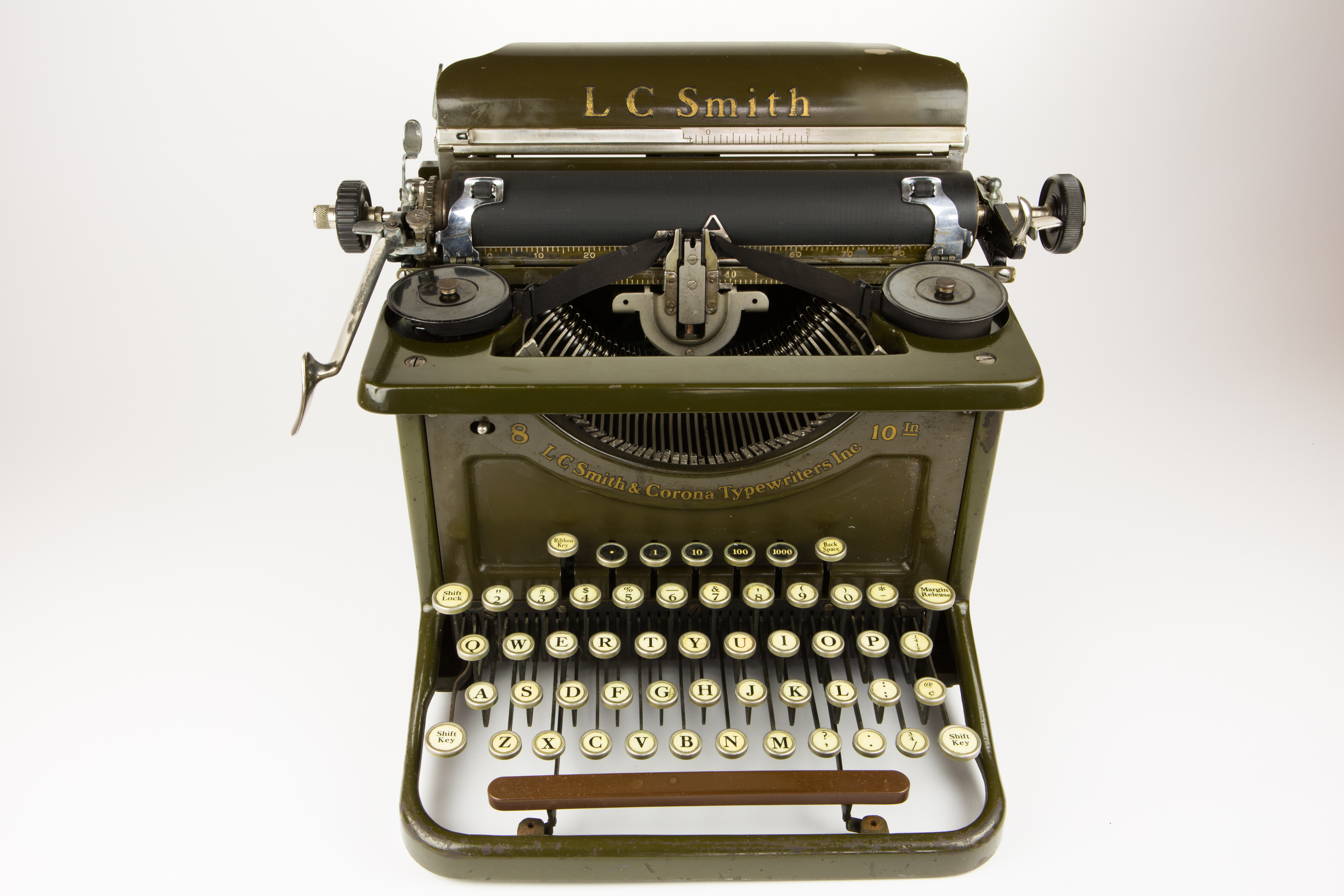 Machine à écrire LC Smith - US Army - Modèle 8/10 - fabriquée en 1934 (USA) - vue utilisateur